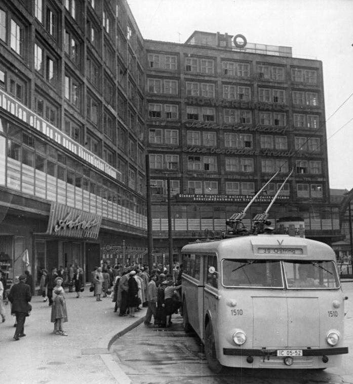 Berlin, Alexanderplatz, HO-Kaufhaus Zentralbild Junge 19.6.1956 HO Warenhaus am Berliner Alexanderplatz (Aufnahmen vom 18.6.1956) UBz: Blick auf das Warenhaus der HO.